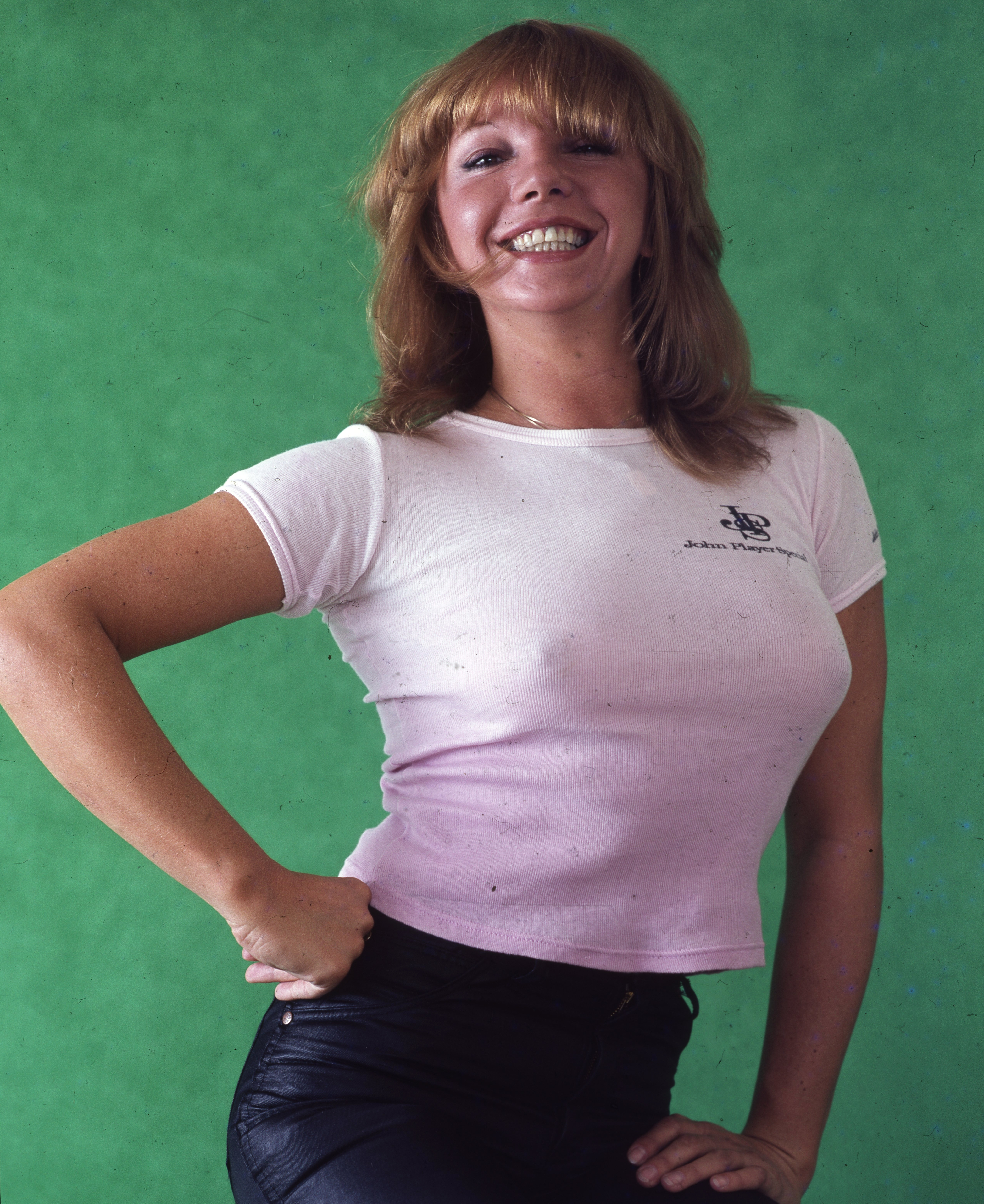 Zalatnay Sarolta énekesnő. Location: Hungary Tags: smile, colorful Title: Zalatnay Sarolta énekesnő.